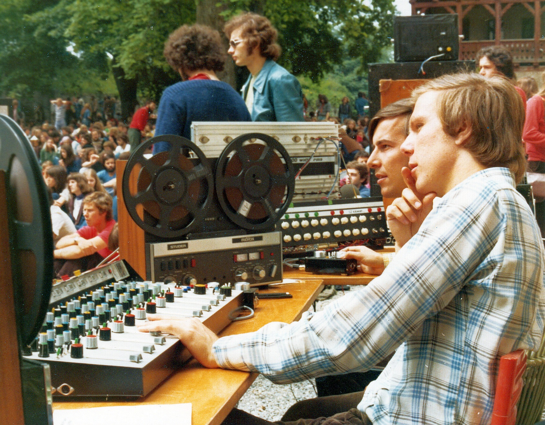 Folkfestival Lenzburg 1975: Tonregie im Schlosshof mit Mischpult, Tonbandmaschinen Revox A77 HS und 6-Kanal-Leistungsverstärker. Vorne Beat Hohmann (Mikrofontechnik, Aufnahmen), hinten Egmont Hohmann (Verstärkung, Beschallung).